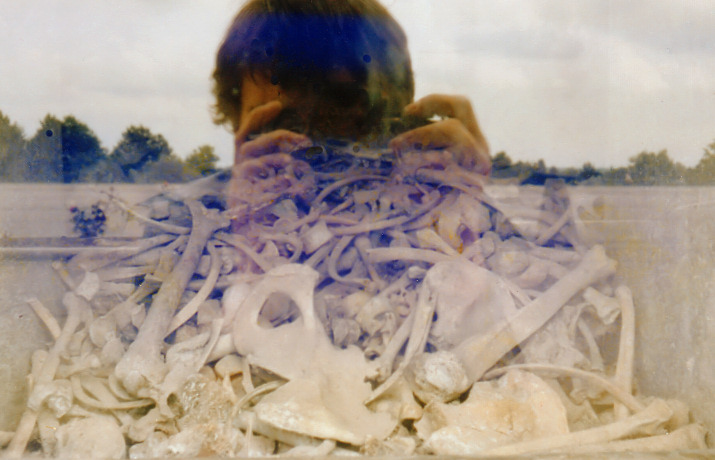 Beinhaus von Douaumont Foto aufgenommen von Benutzer User:Axel Hindemith, Juni 1978